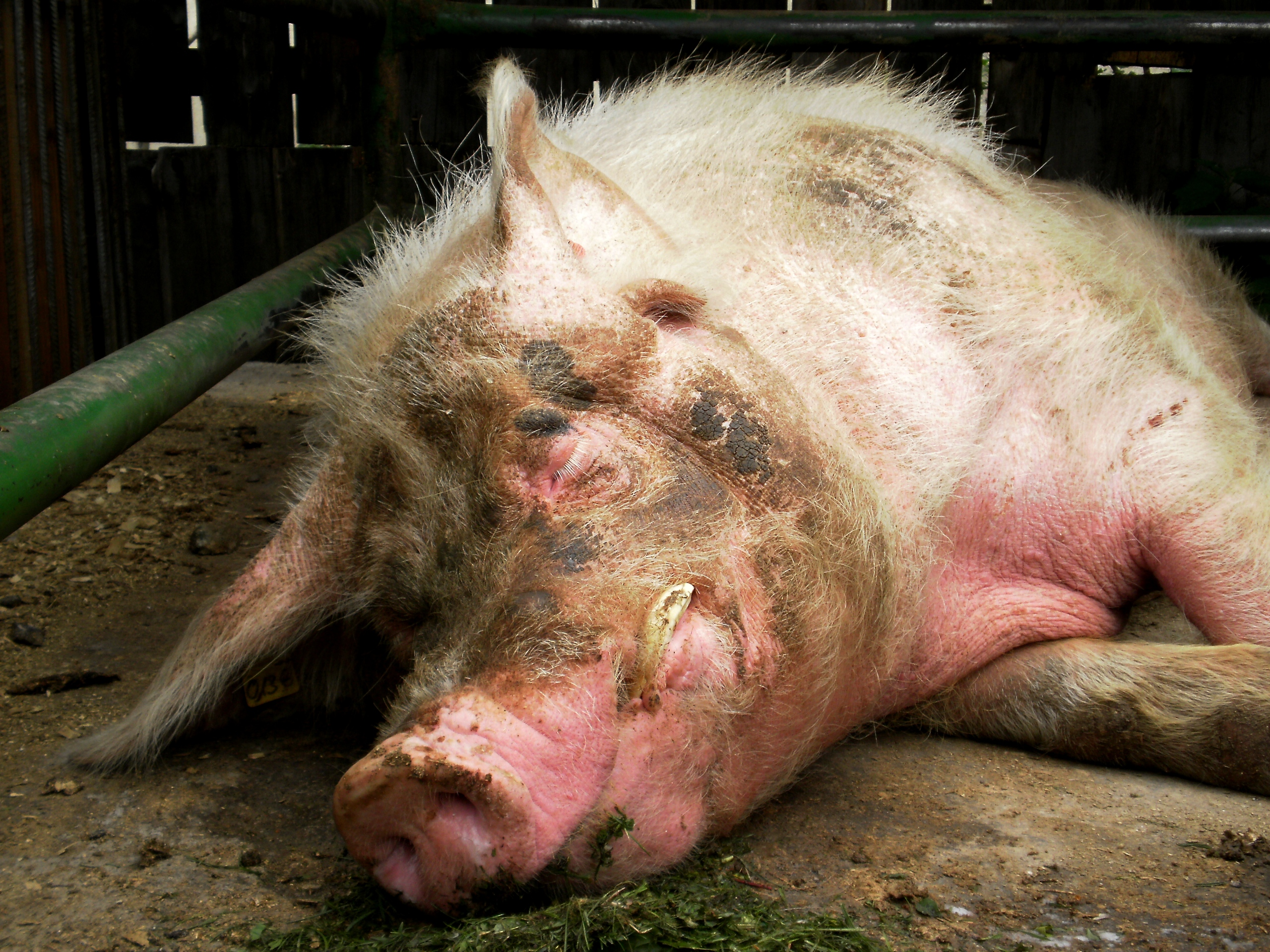 Spiaca sviňa